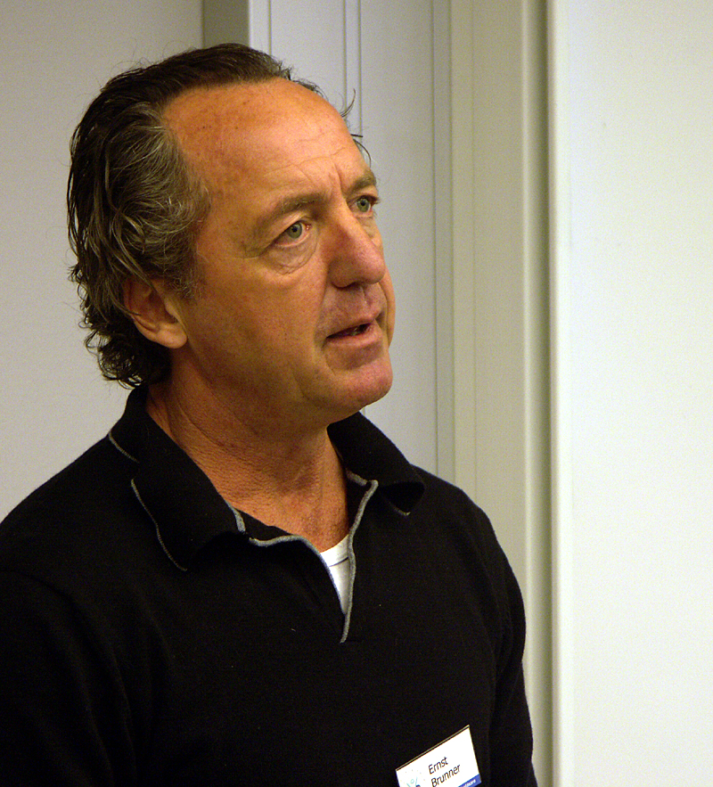 Portrait of Ernst Brunner